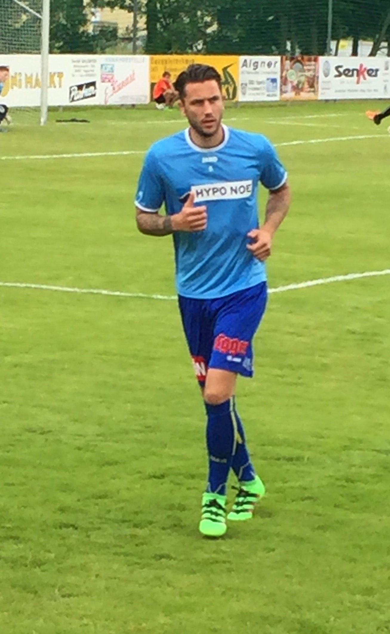 Kai Heerings